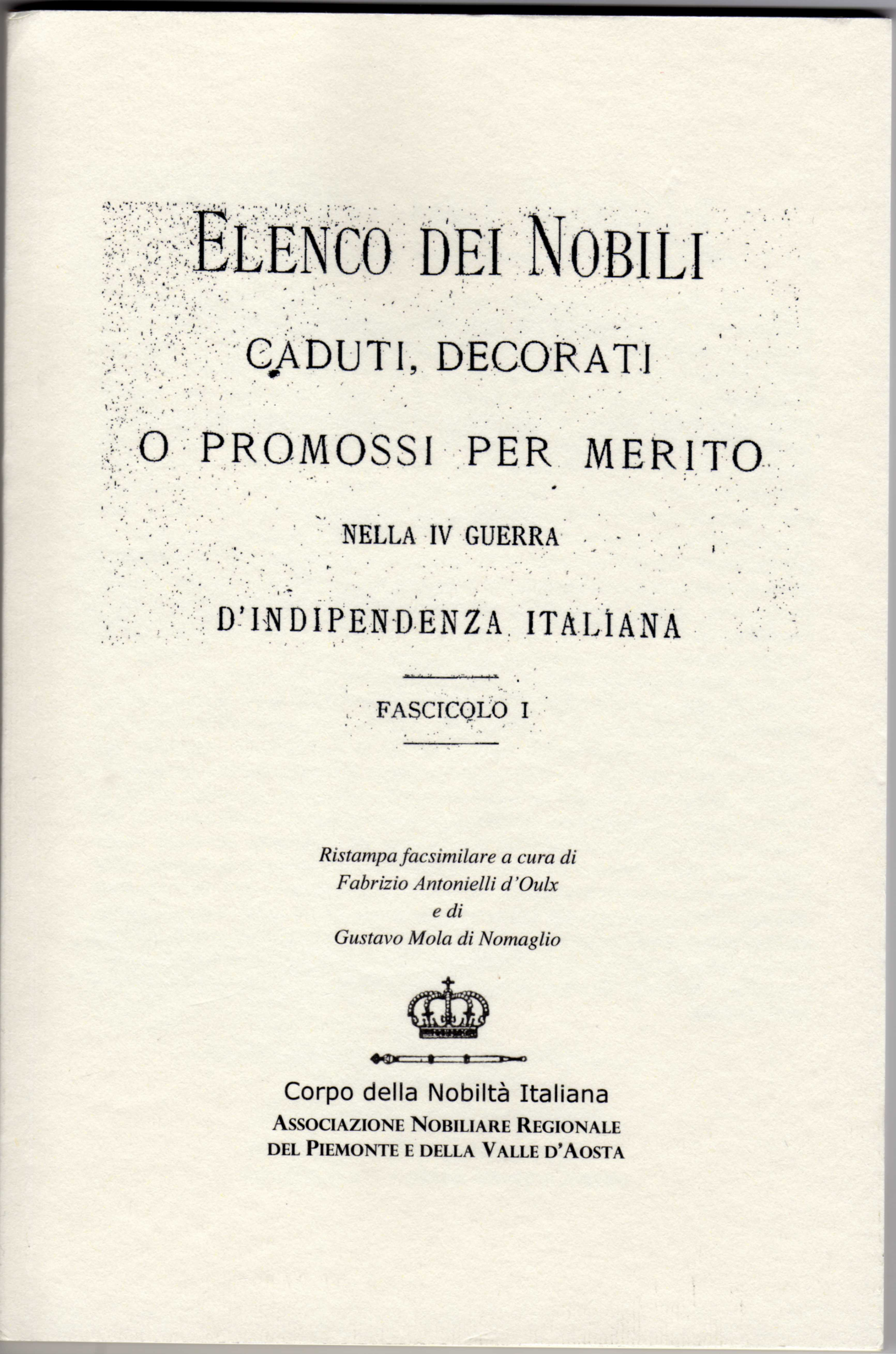 Corpo della Nobiltà Italiana - Elenco dei Nobili caduti, decorati o promossi per merito nella IV Guerra d’ Indipendenza Italiana - Fascicolo I